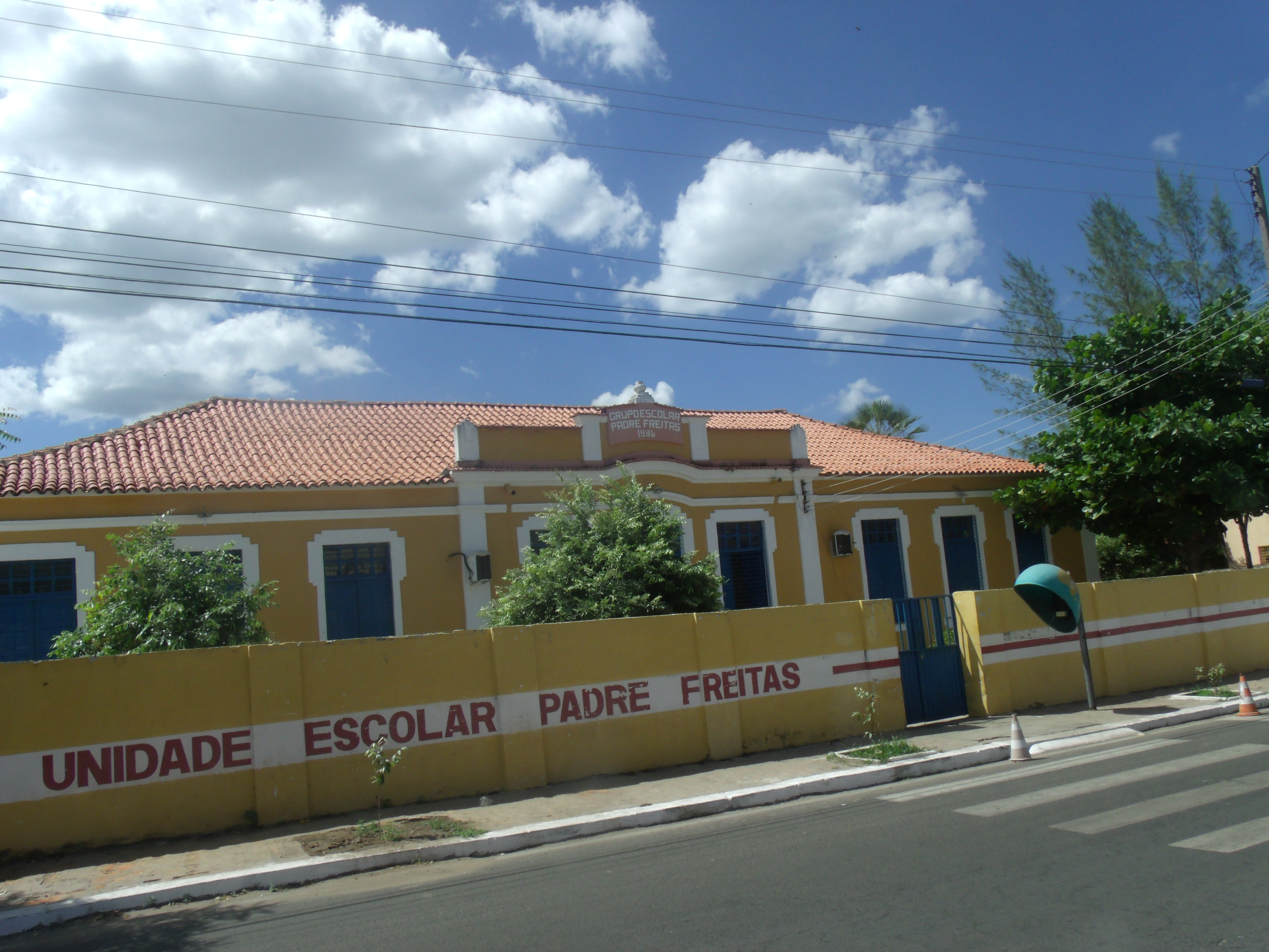 Vista da frente do prédio histórico do Grupo Escolar Padre Freitas em Piripiri, no Piauí.